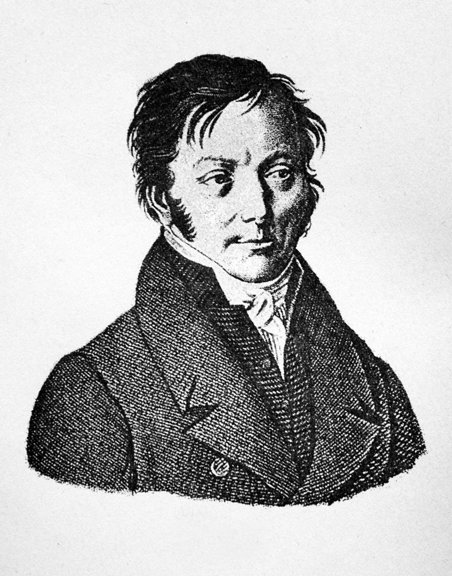 Jean Etienne Dominique Esquirol (1772 – 1840). Nach einer zeitgenössischen Lithographie, Künstler nicht ermittelt.